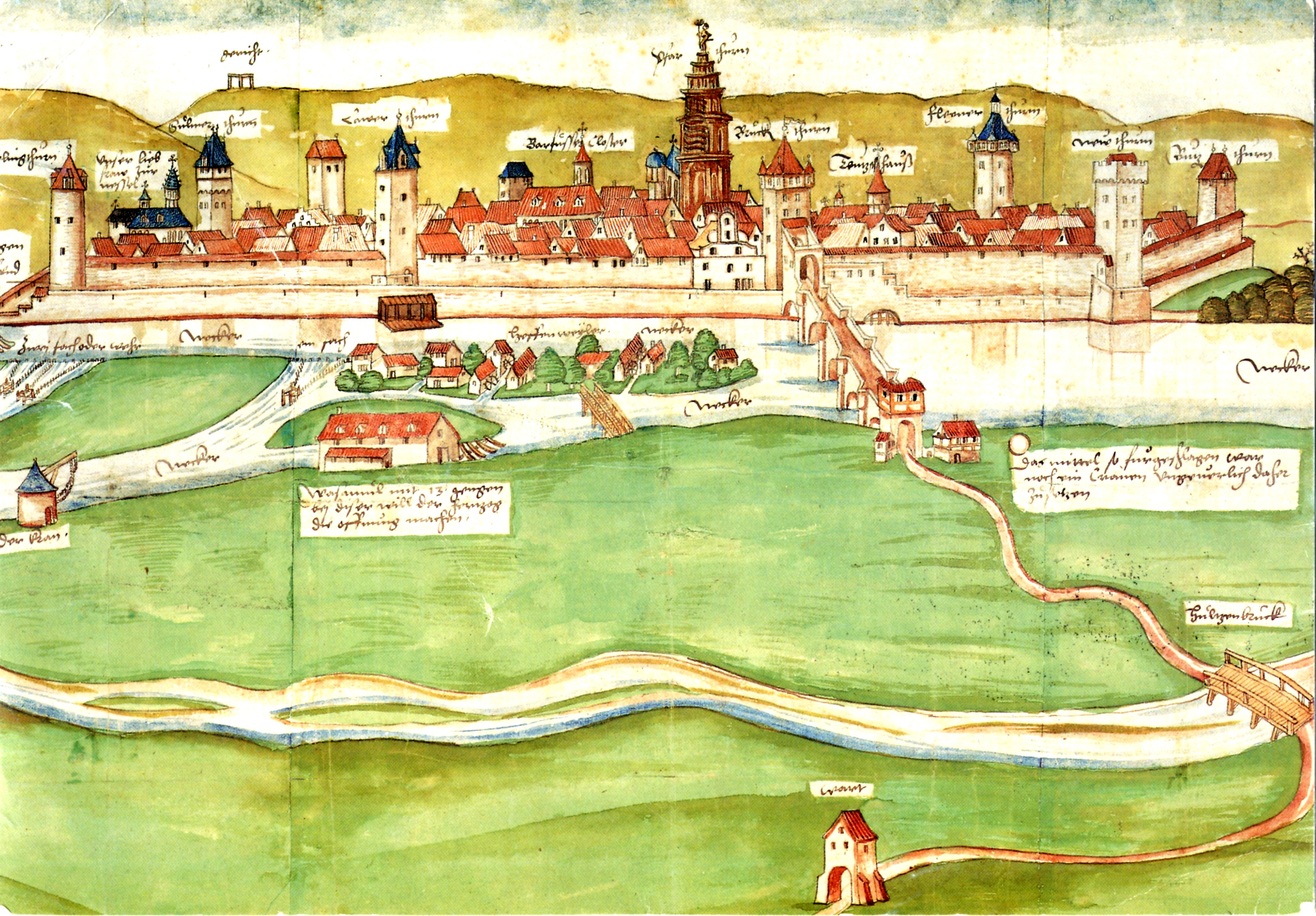 Älteste erhaltene Ansicht der Stadt Heilbronn (Ausschnitt), entstanden anlässlich eines Rechtsstreits um Wasser- und Triebwerksgerechtigkeiten am Neckar. Ansicht von Westen. Aquarellierte Federzeichnung.